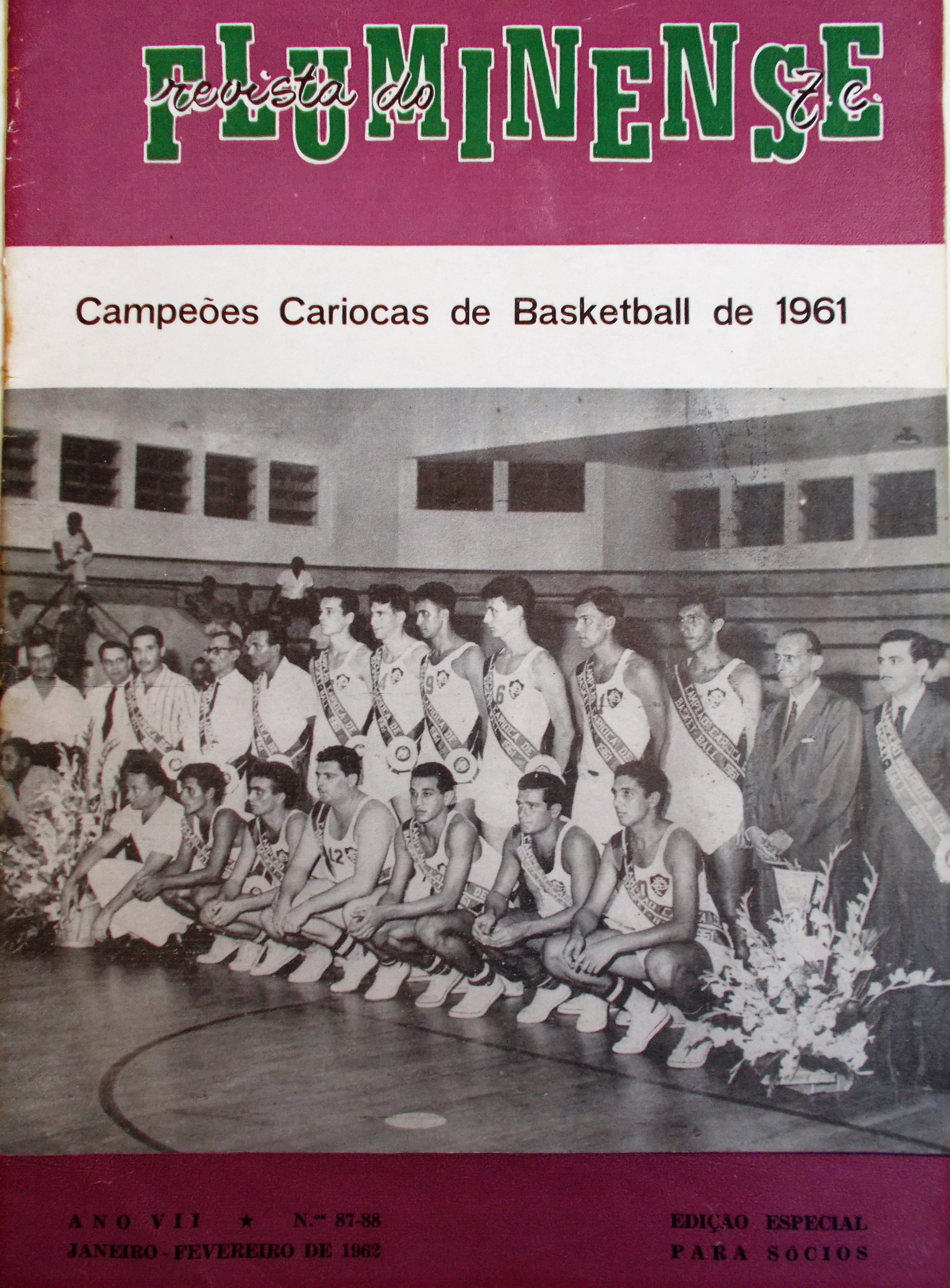 Foto Oficial